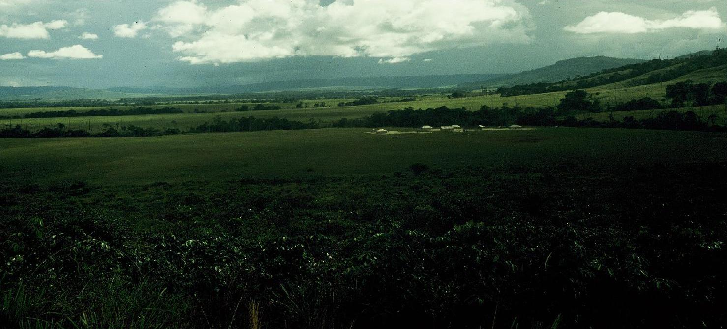 San Rafael de Kamoirán